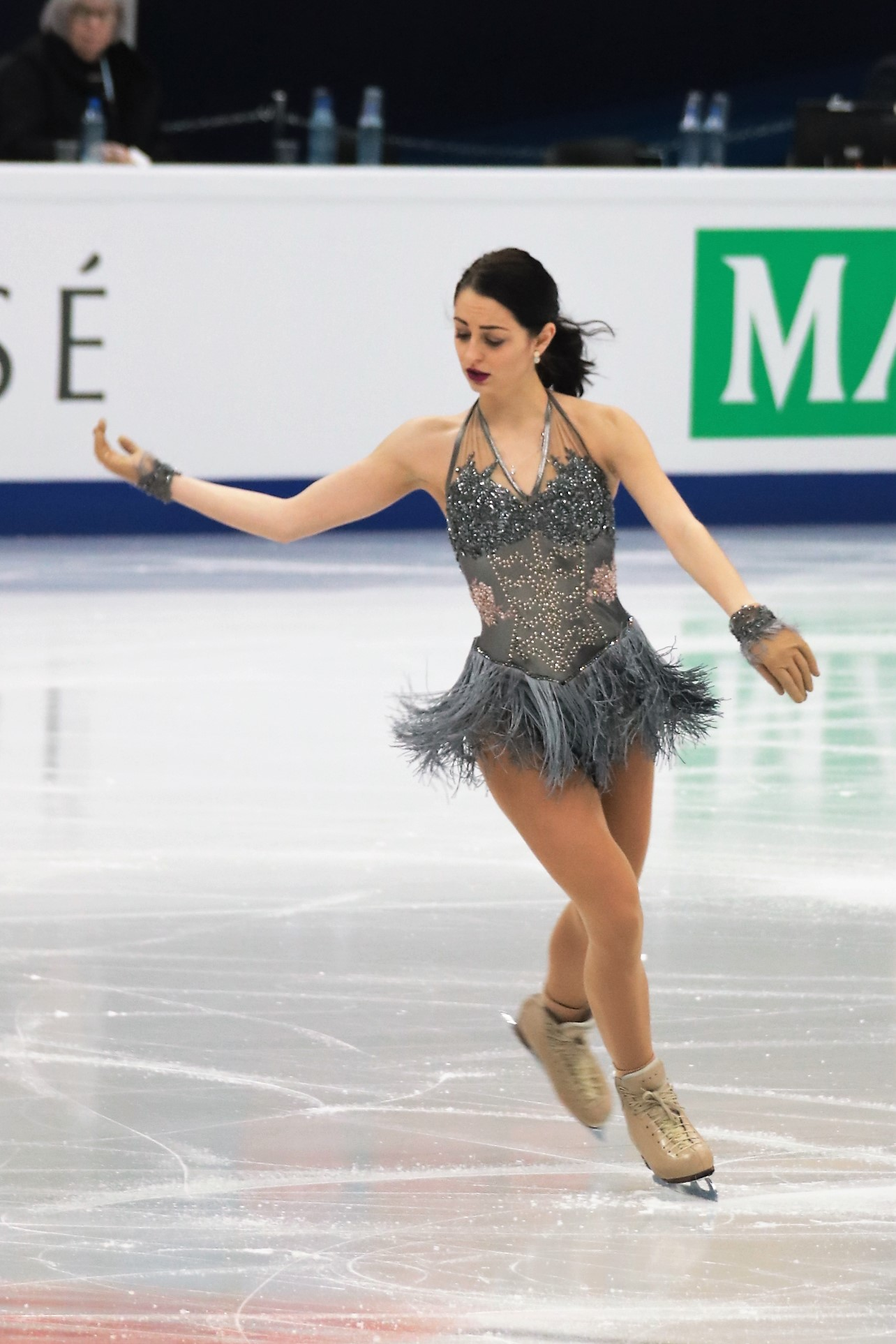 Юлия Саутер (Румыния) на Чемпионате Европы по фигурному катанию 2018.